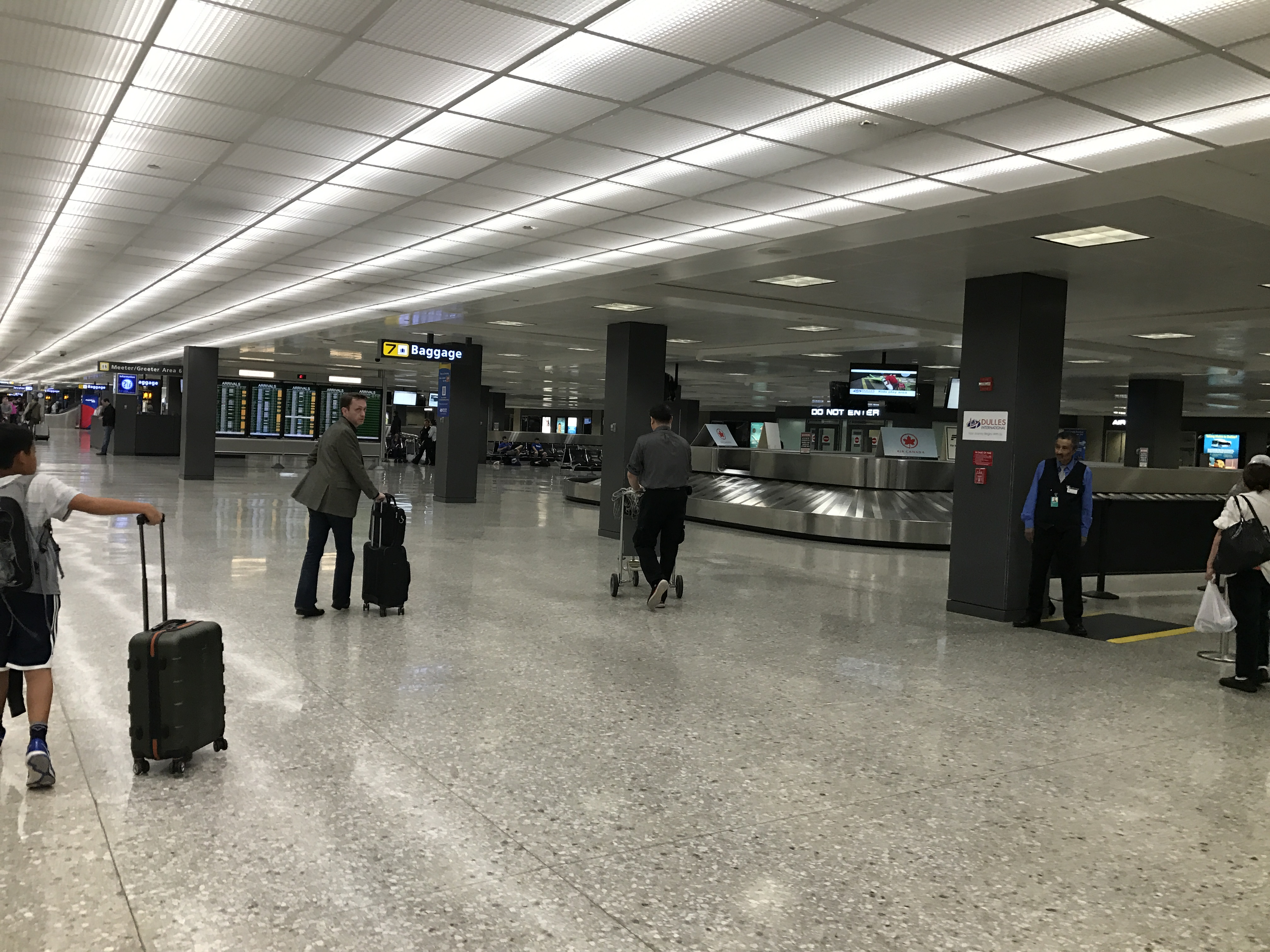 Bandas de reclamo nacional del Aeropuerto Internacional de Washington Dulles.